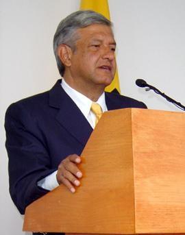 El Lic. Andrés Manuel López Obrador en conferencia diaria celebrada en el Palacio del Ayuntamiento del Distrito Federal.